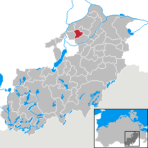 Neverin in Mecklenburg-Vorpommern, Landkreis Mecklenburg-Strelitz